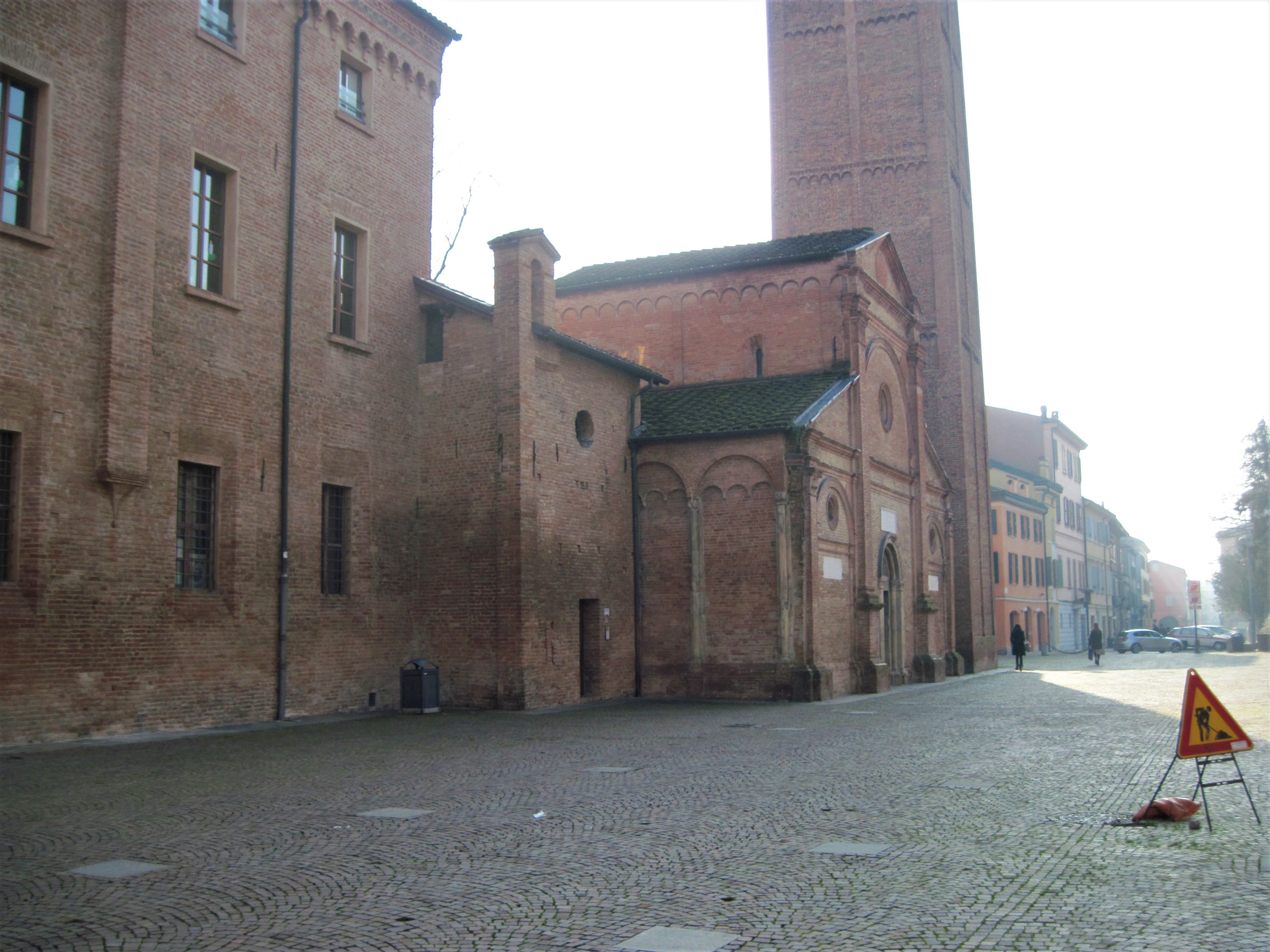 parte di Palazzo di Castelvecchio, chiesa della Sagra col suo campanile in Piazzale Re Astolfo